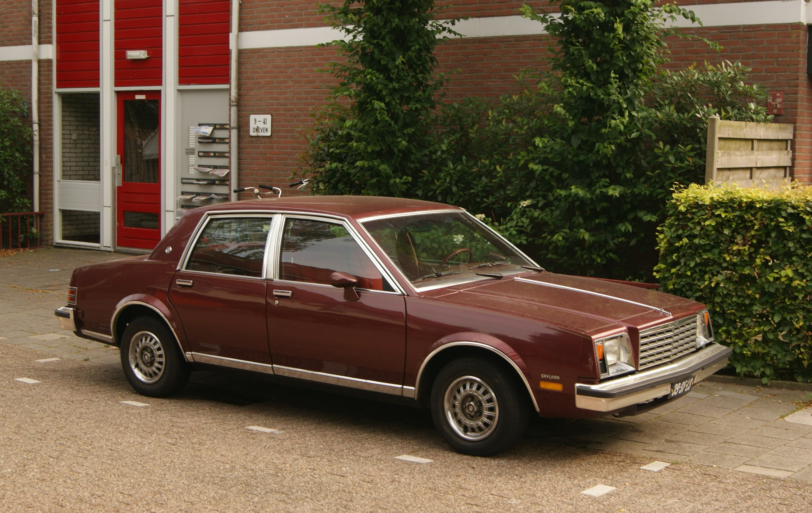 39-SF-LS